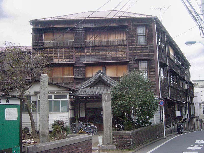 Résidence étudiante Hongo